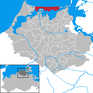 Zingst in Mecklenburg-Vorpommern - District Nordvorpommern